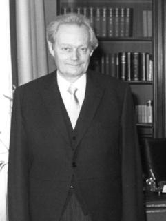 Title: Bonn, Carstens mit Botschafter von Somalia Extra information: Von links: Hans-Werner Lautenschlager, Karl Carstens, Ibrahim Megag Samater, Hans Neusel People in the image: Carstens, Karl Prof. Dr.: Bundespräsident, MdB, CDU, Bundestagspräsident, Staatssekretär Auswärtiges Amt, Bundesrepublik Deutschland * Lautenschlager, Hans-Werner Dr.: Staatssekretär im Auswärtigen Amt, Bundesrepublik Deutschland * Neusel, Hans: Staatssekretär im Innenministerium, Leiter des Bundespräsidialamtes, Bundesrepublik Deutschland Factual corrections and alternative descriptions are encouraged separately from the original description. Additionally errors can be reported at this page to inform the Bundesarchiv. Original historic description: Bonn, 20. Mai 1980 Bundespräsident Karl Carstens empfing den Botschafter der Demokratischen Republik Somalia, Ibrahim Megag Samater, zur Überreichung seines Beglaubigungsschreibens. Im Bild: Im Arbeitszimmer des Bundespräsidenten v.l.n.r.: Dr. Hans-Werner Lautenschlager, Staatssekretär im Auswärtign Amt, Bundespräsident Karl Carstens, Botschafter Ibrahim Megag Samater und Staatssekretär Hans Neusel, Chef des Bundespräsidialamtes